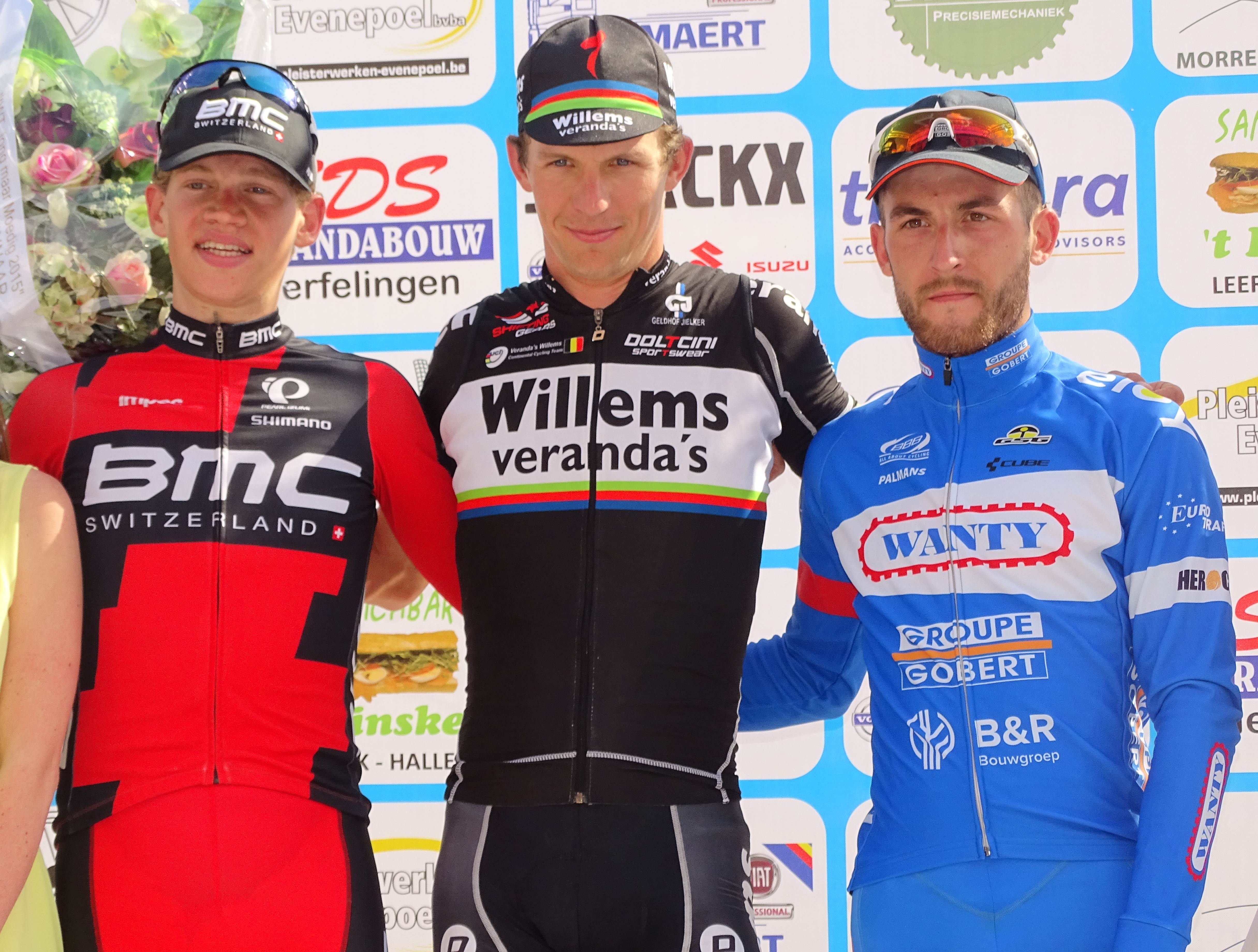 Reportage réalisé le mercredi 24 juin à l'occasion du départ et de l'arrivée de l'Internationale Wielertrofee Jong Maar Moedig 2015 à Oetingen (Gooik), Belgique.